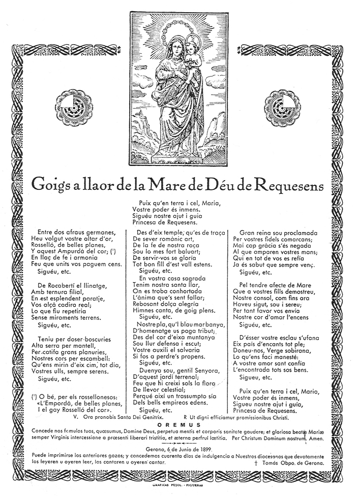 Goigs a llaor de la Mare de Déu de Requesens (Figueres, 1899)